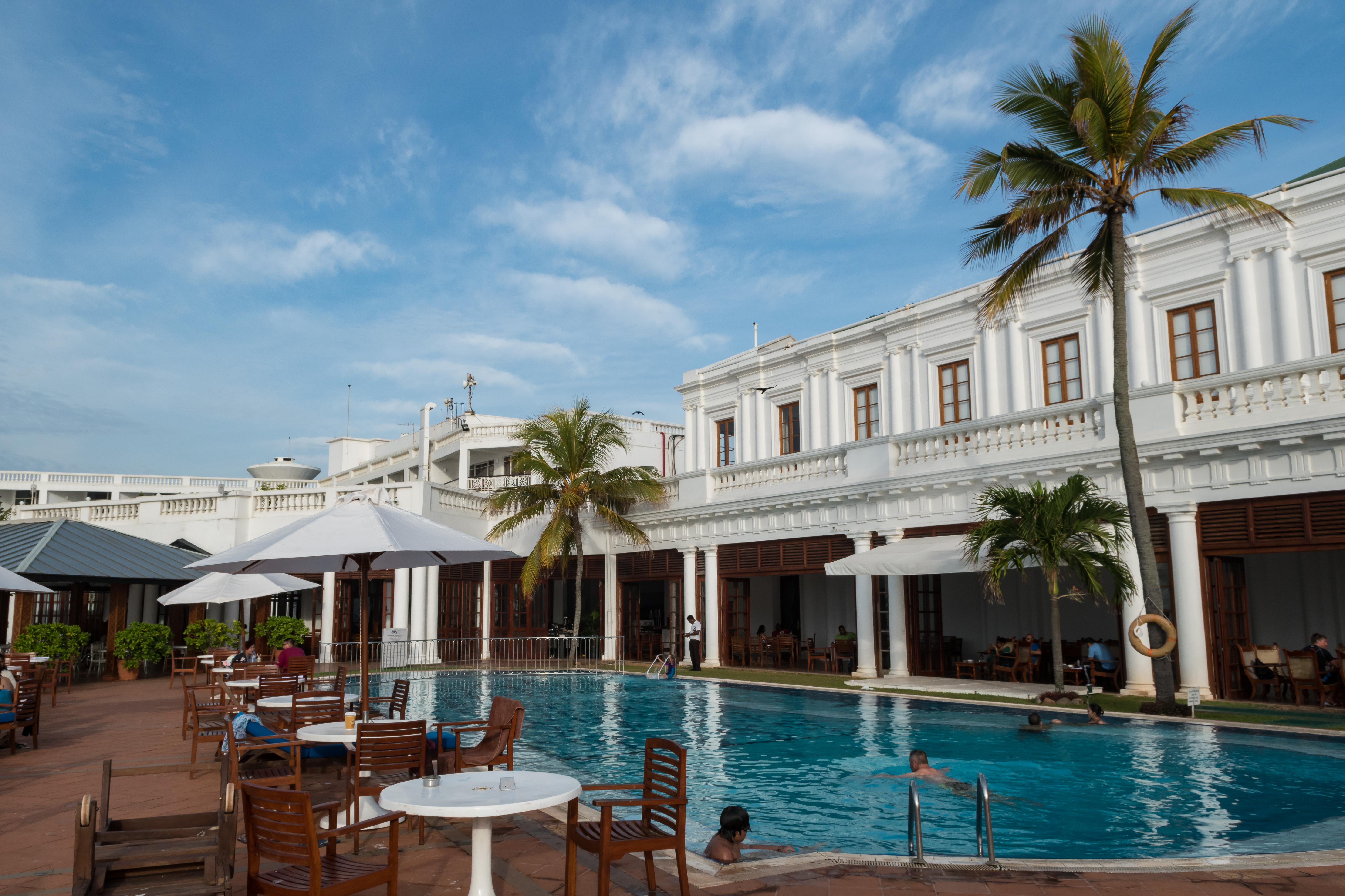 Mount Lavinia Hotel Sri Lanka